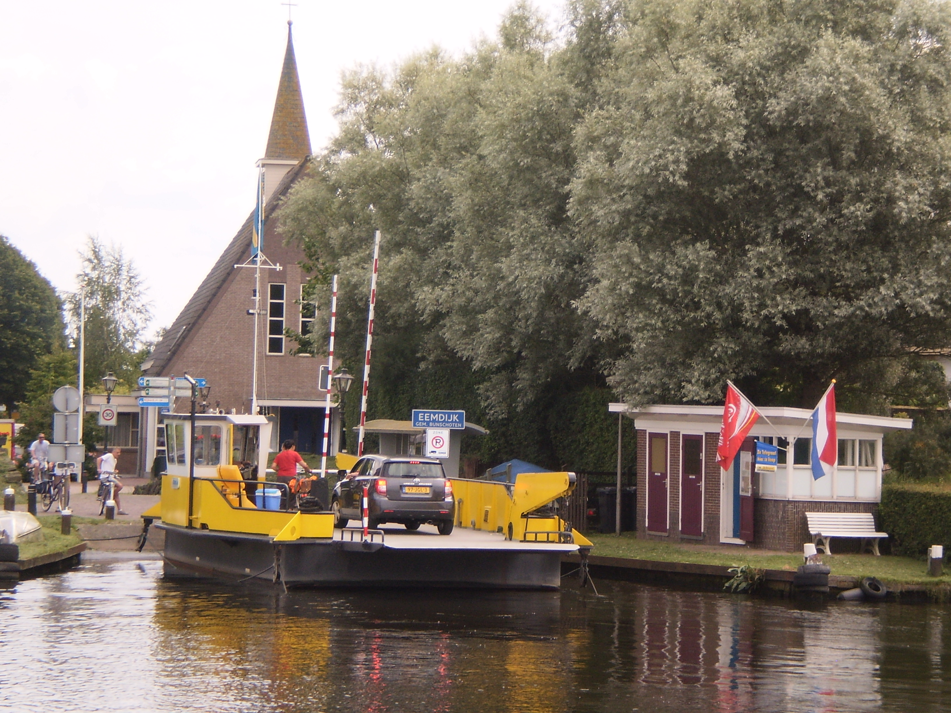 Ofbyld oanbean troch Swarte Kees op 5 augustus 2009